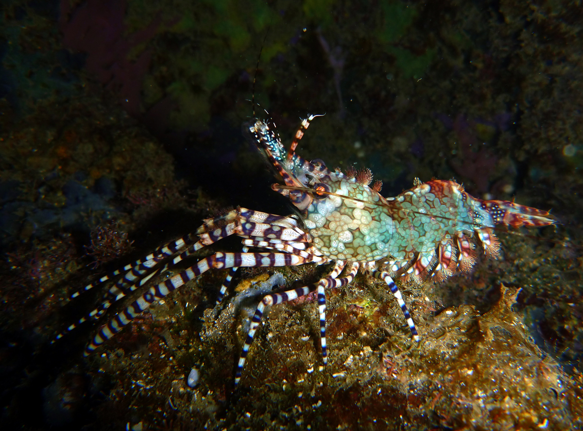 Une crevette marbrée (Saron marmoratus) mâle à la Réunion.